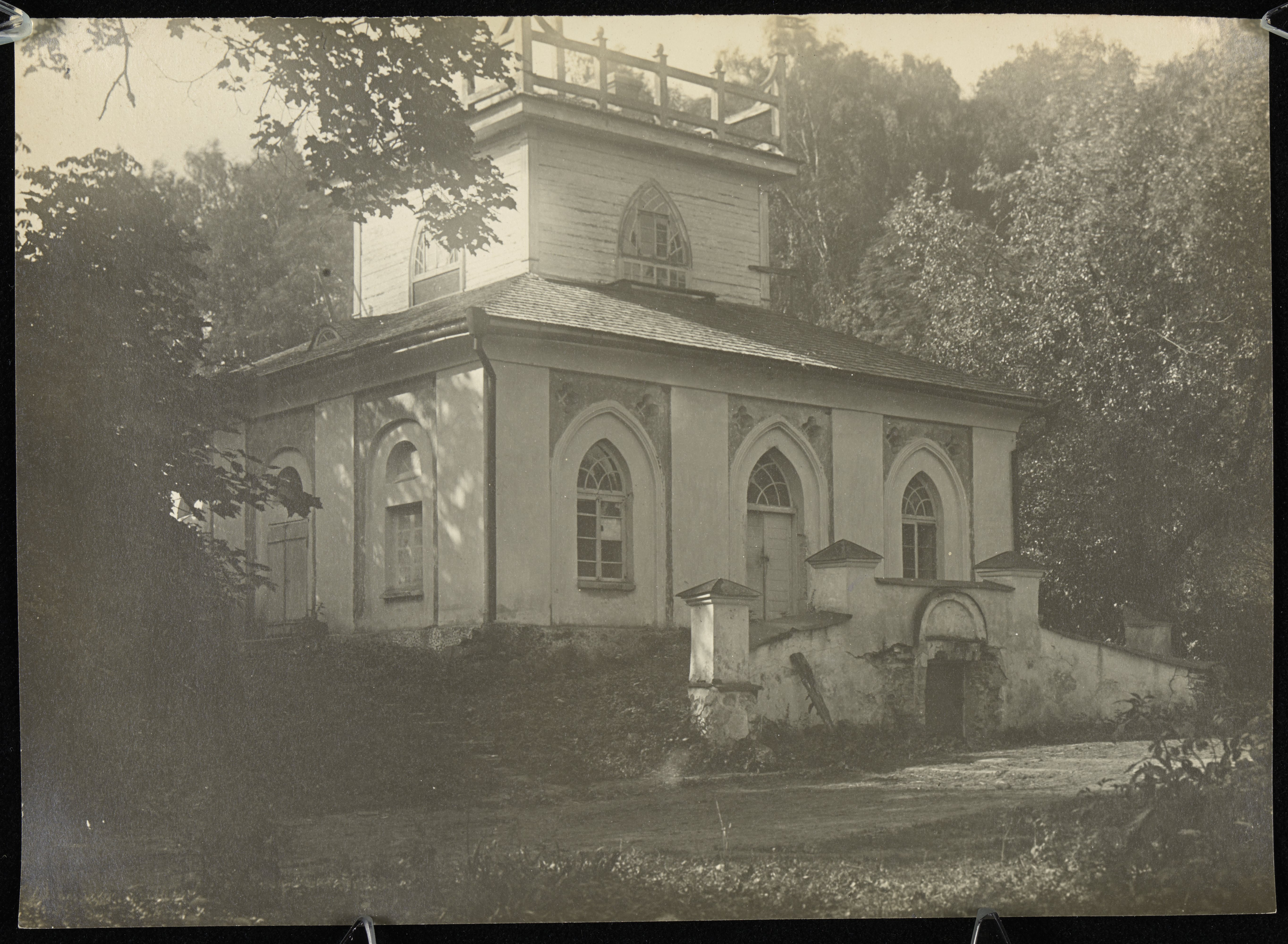 Беларуская (тарашкевіца): Сянежыцы (Sianiežycy), сядзіба Юндзілаў (Jundził). Павільён